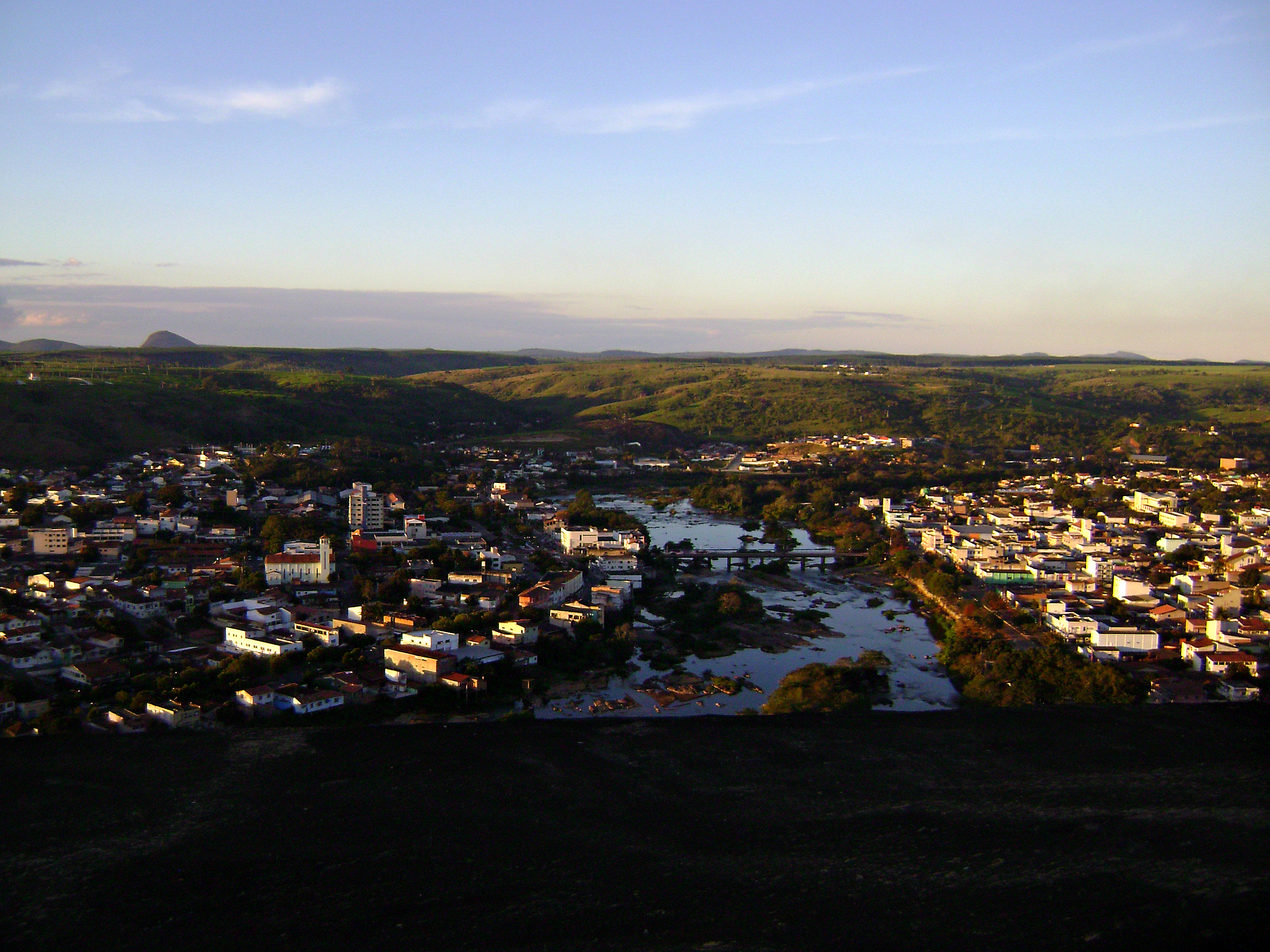 Vista da Pedra do Bueno, Nanuque